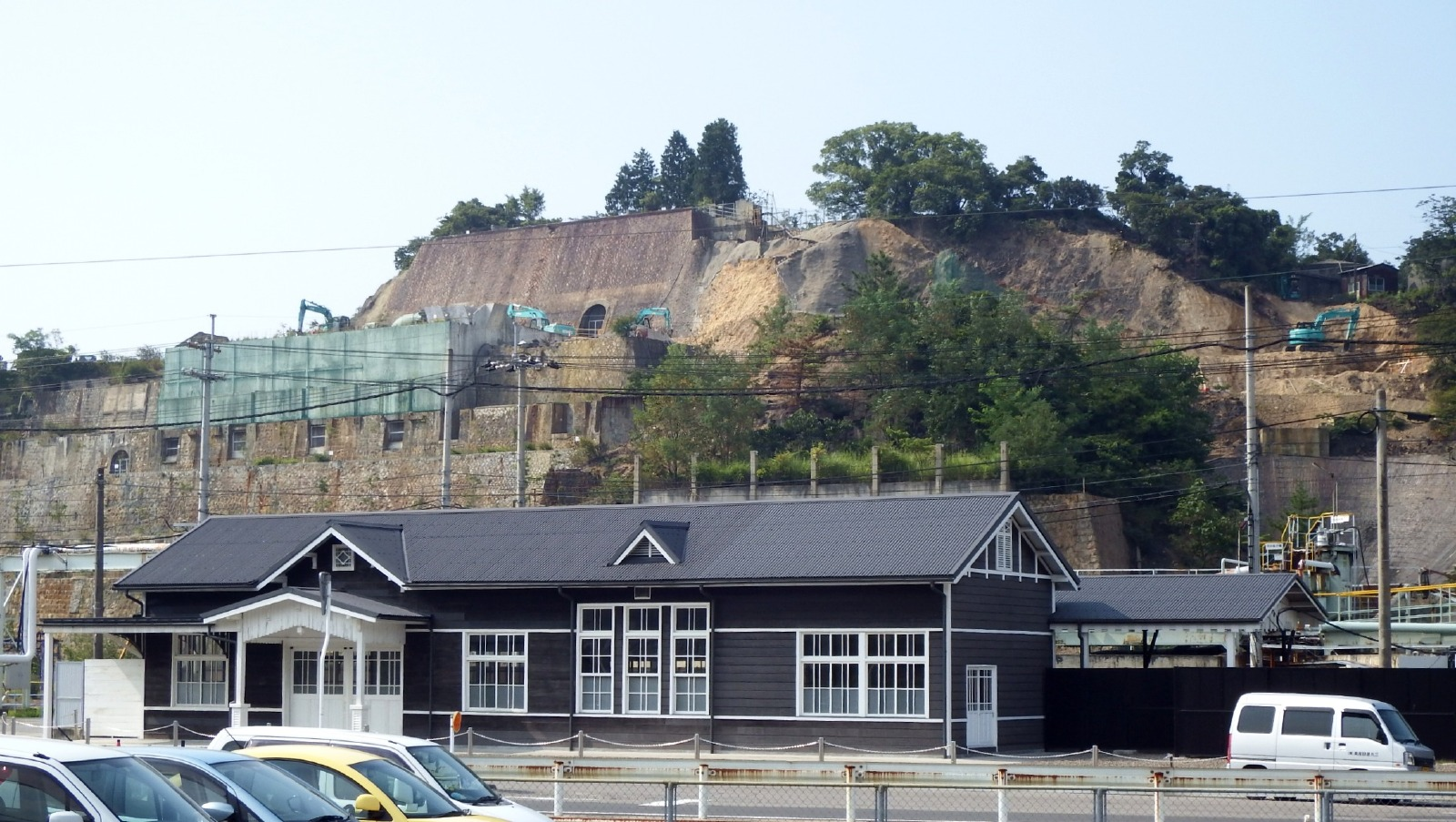 新居浜市の星越